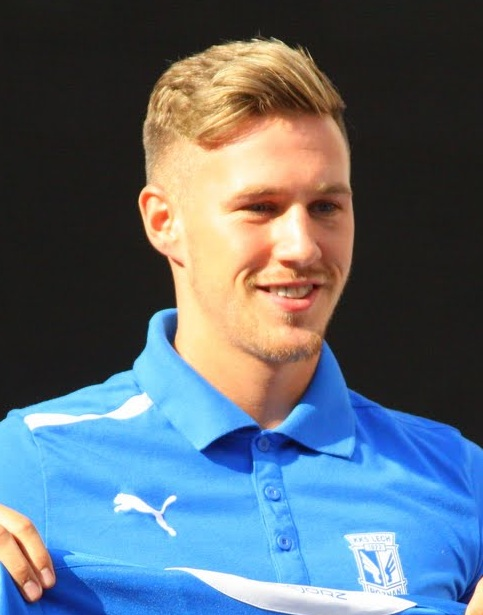 Barry Douglas na prezentacji Lecha Poznań.